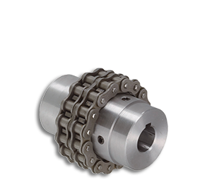 Цепная муфта без кожуха